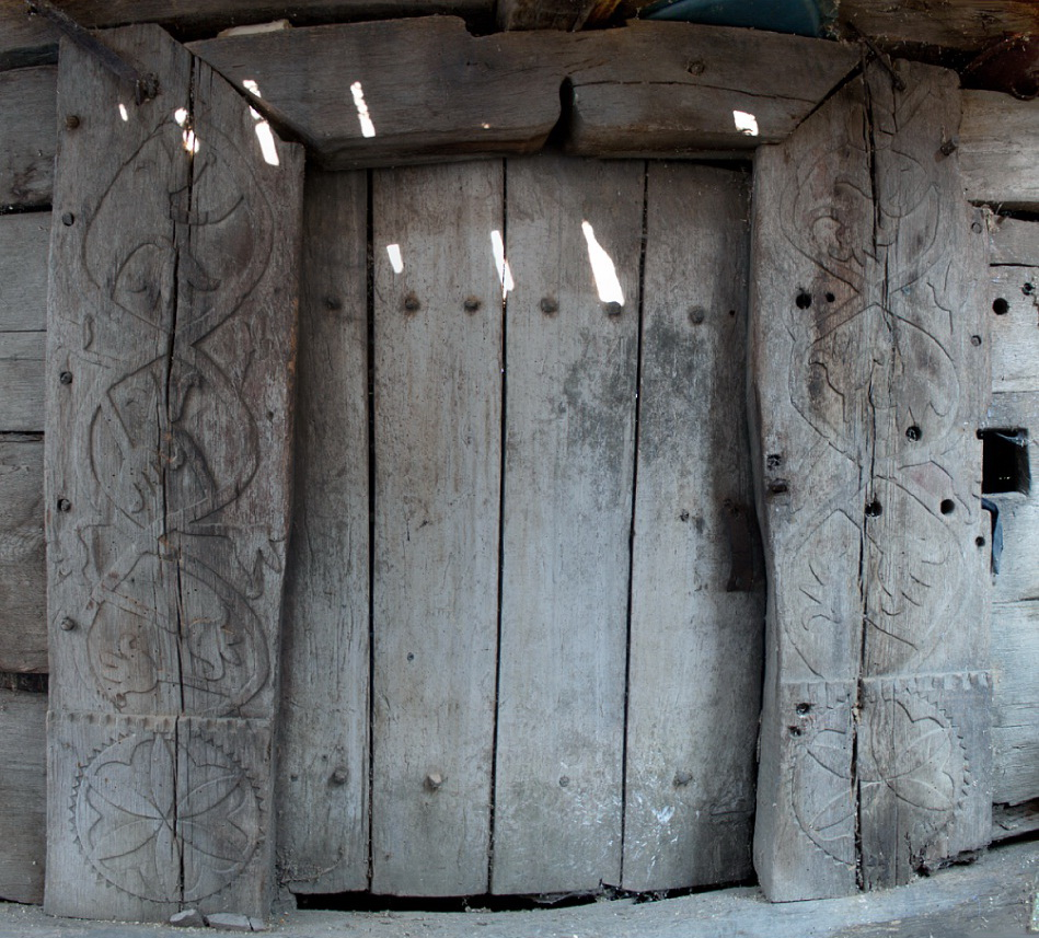 Portalul bisericii de lemn din Rus, județul Sălaj.